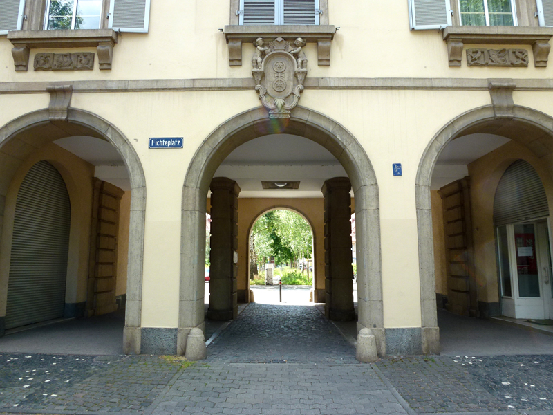 Siedlung am Fichteplatz Eingangsportal, Detailaufnahme